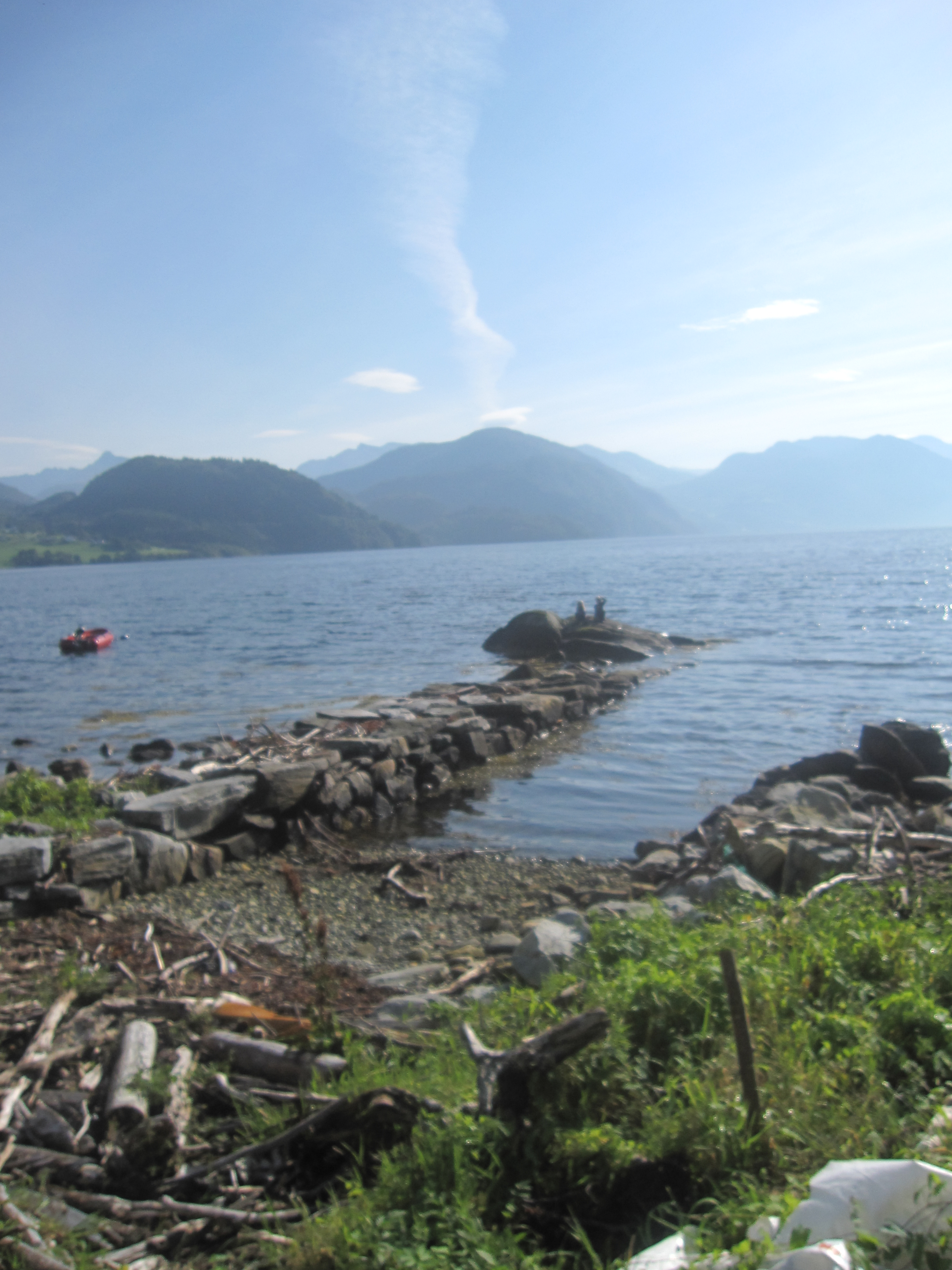 Postvorren på Amdam i Ørskog kommune